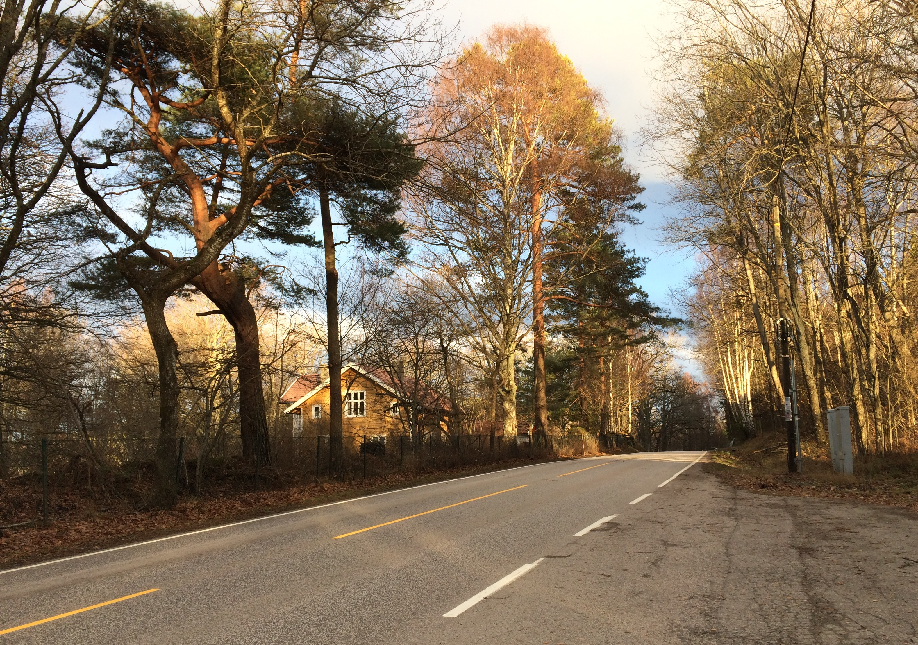 Larkollveien (fylkesvei 119) nord for Larkollen